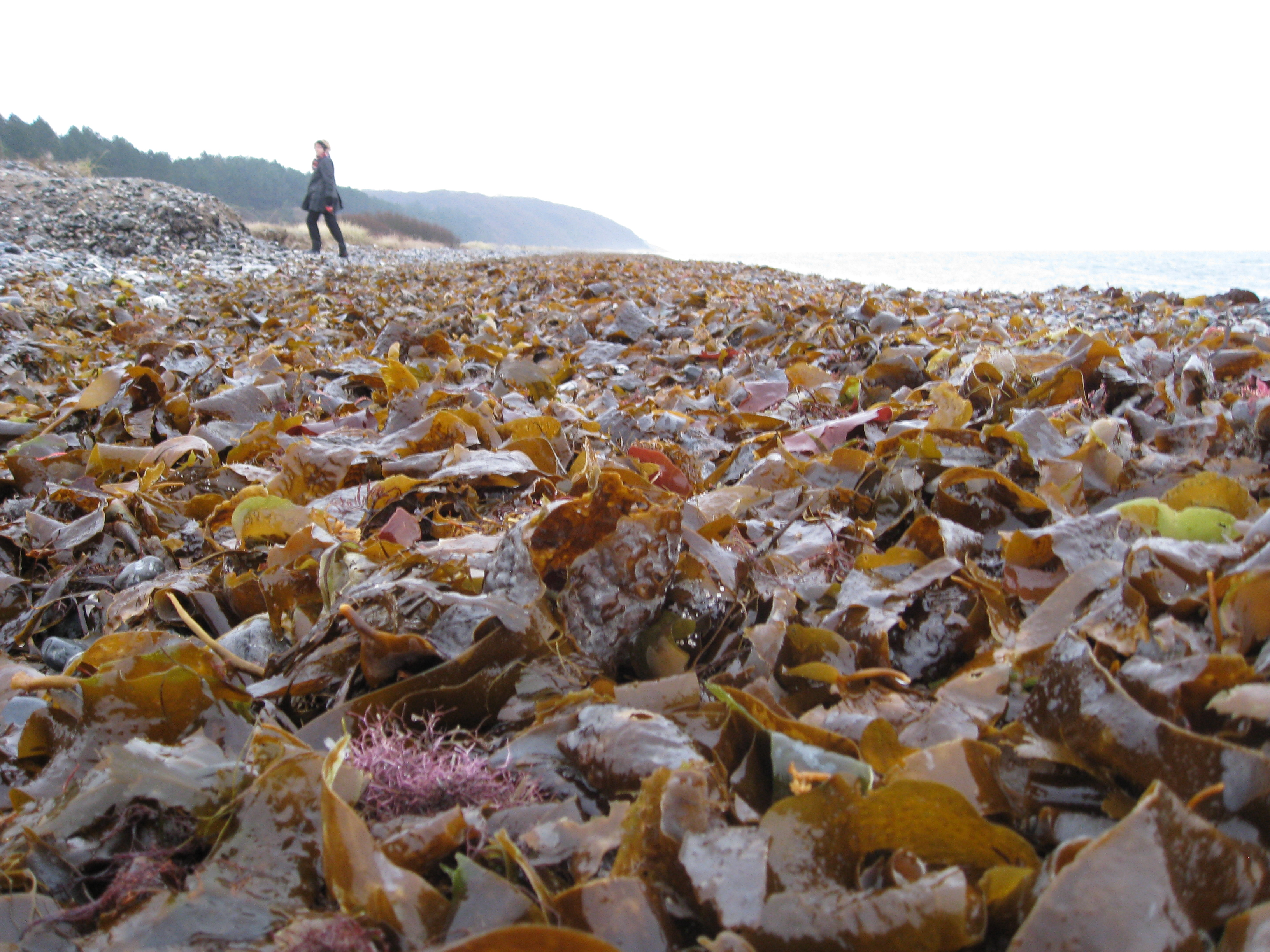 Glatved Strand, tang